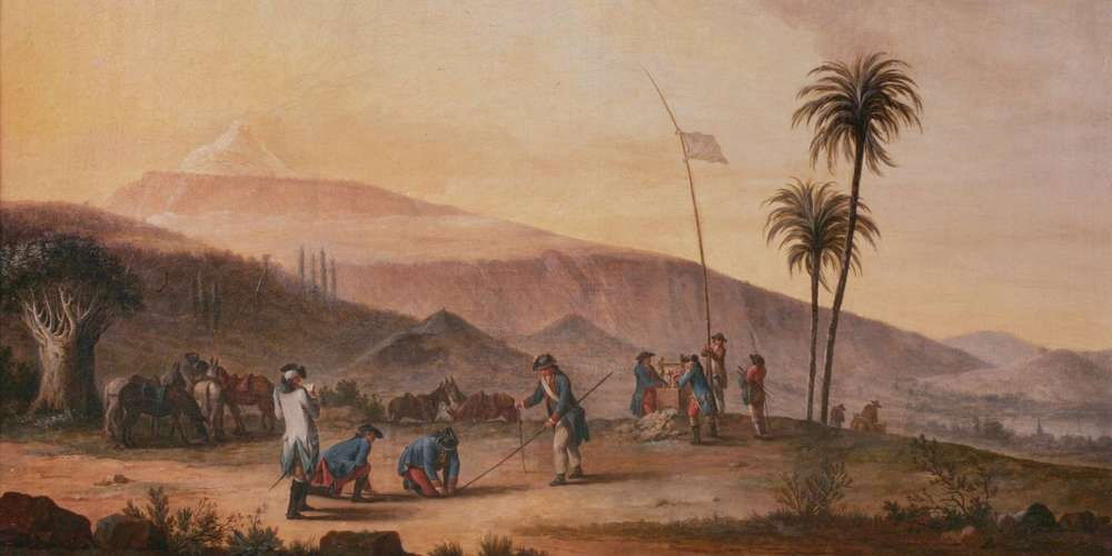 Jean-Charles de Borda mesurant le Pic de Ténériffe - peinture de Pierre Ozanne, 1775-1776 - Musée Borda